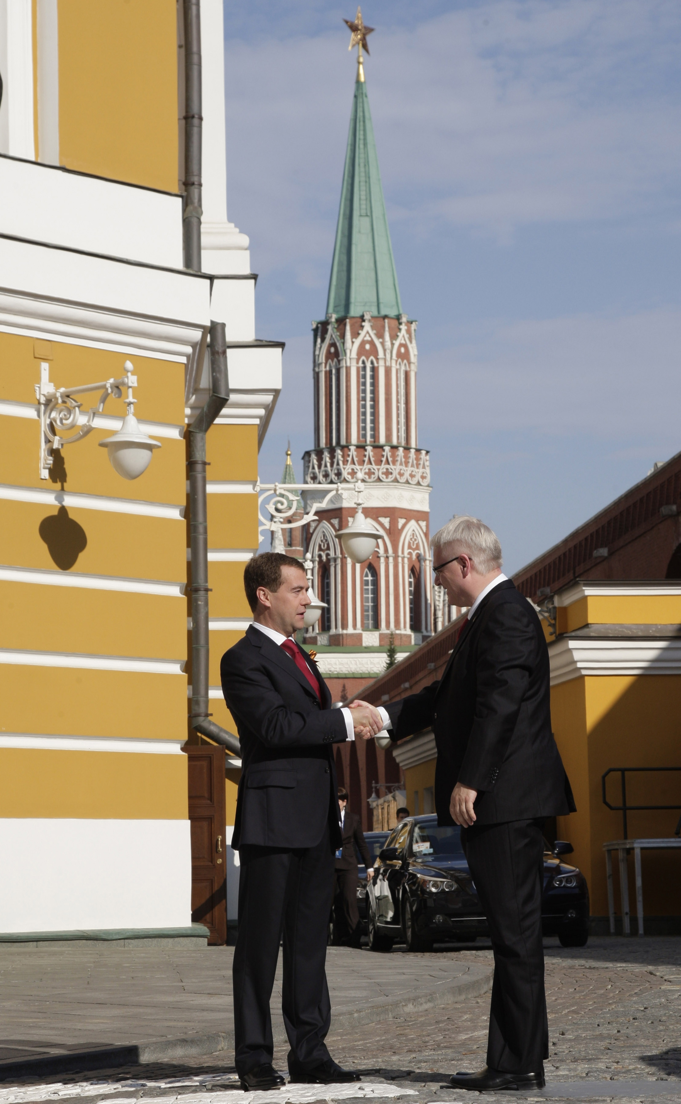 С Президентом Хорватии Иво Йосиповичем.